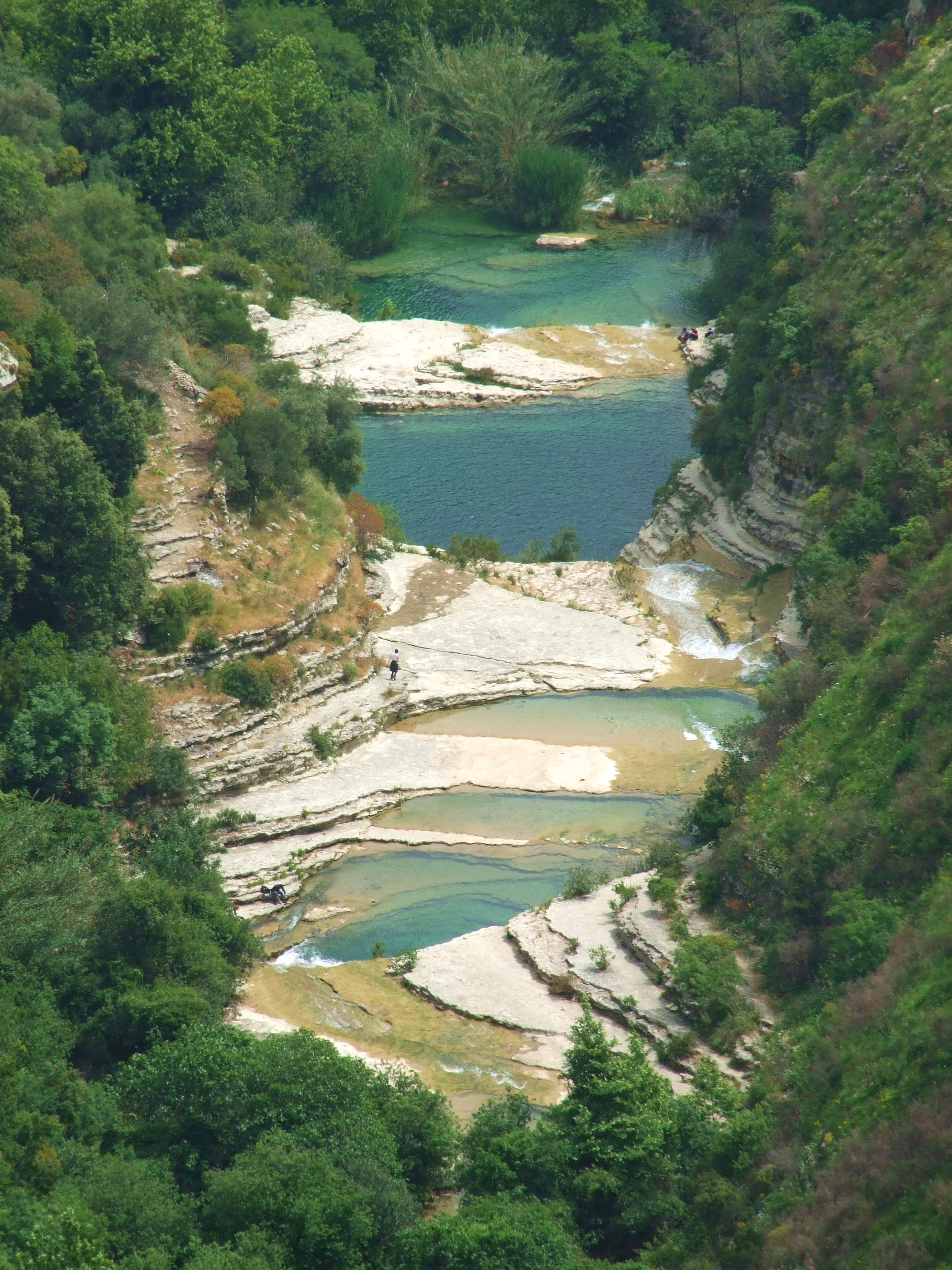 I Laghetti (Cava Grande del Cassibile)